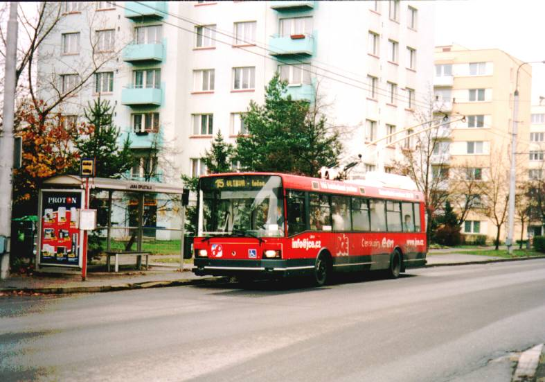 Trolejbusy v Českých Budějovicích